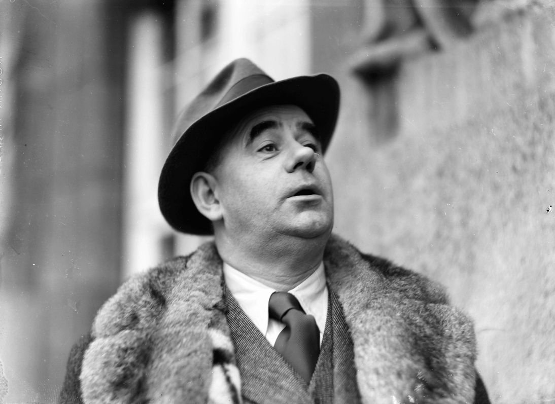 Berlin, Eden-Hotel, Balkon: Weiß Ferdl; Portrait mit Hut